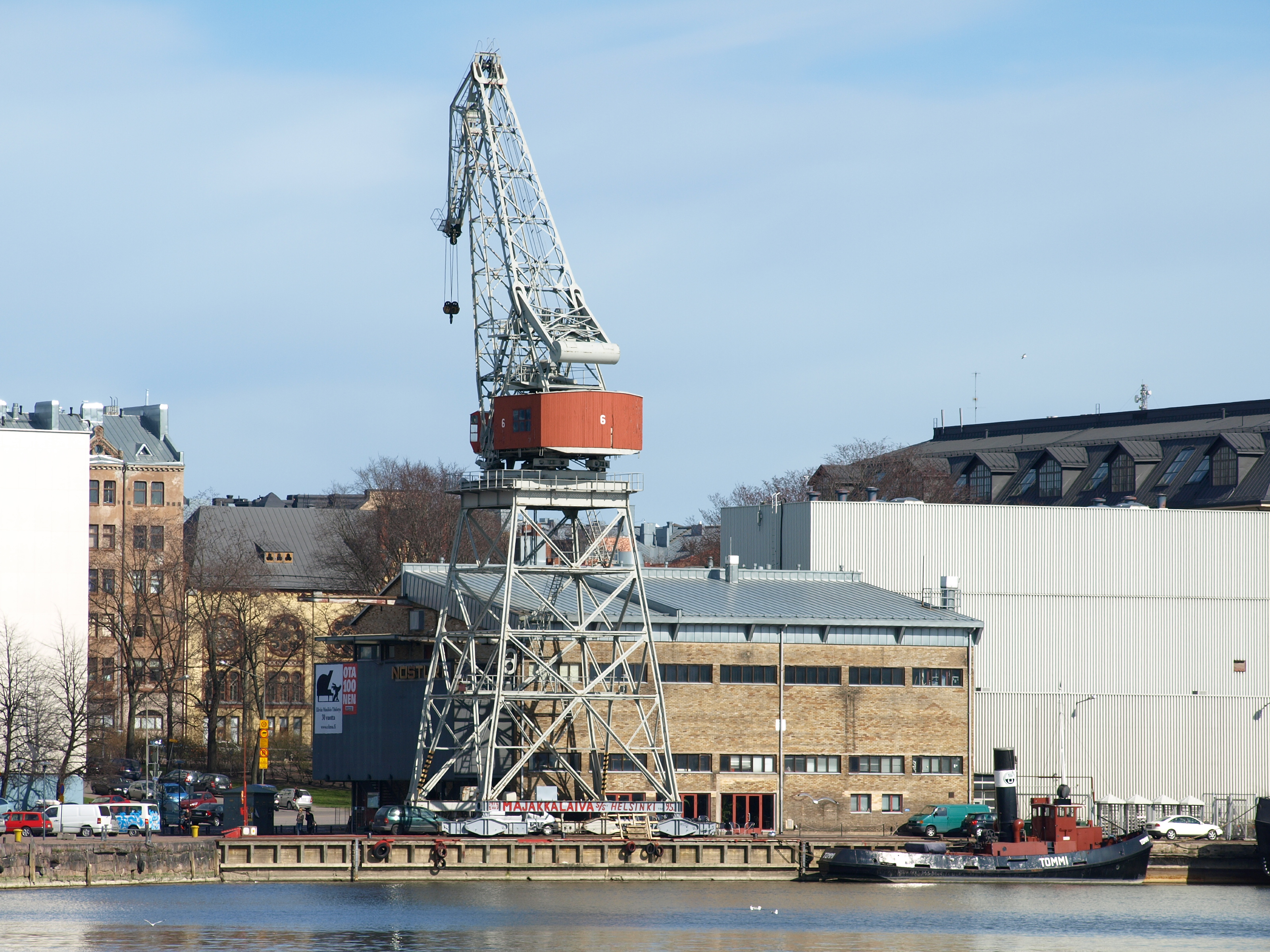 Nosturi